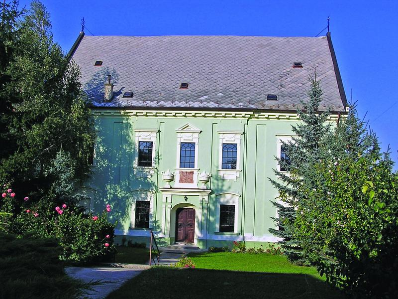 Anhand des Toleranzpatentes im Jahre 1785 vom Architekturbüro Altenburger errichtetes Bethaus in Sommerein.